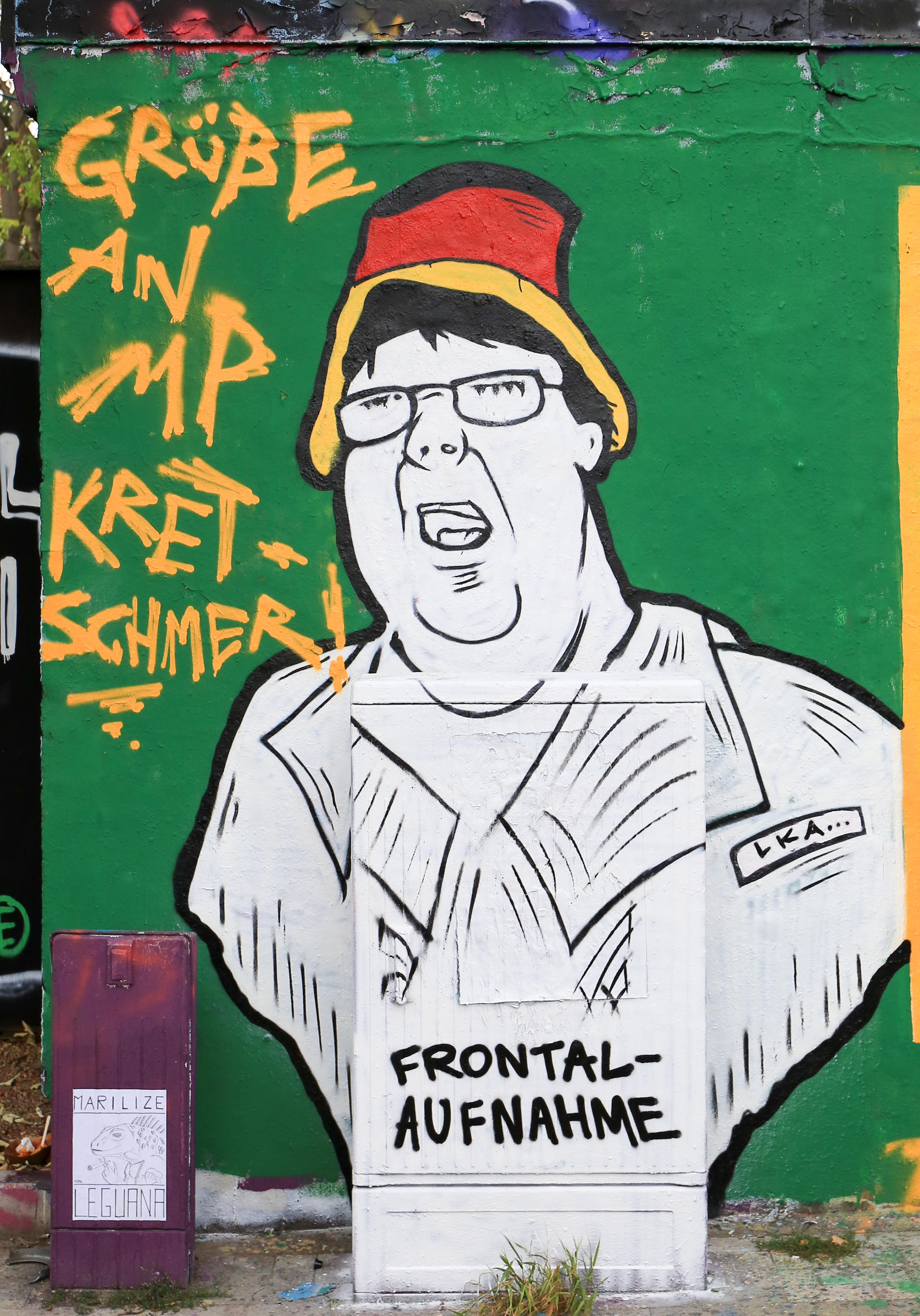 Graffiti in der Alaunstraße in Dresden. Das Motiv bezieht sich auf die Auseinandersetzung während einer Pegida-Demonstration zwischen einem Kamerateam von Frontal 21 und einem Demonstrationsteilnehmer sowie die umstrittene Polizeiaktion, welche die Pressearbeit behinderte. "Grüße an MP Kretschmer" "Frontal-Aufnahme, LKA"